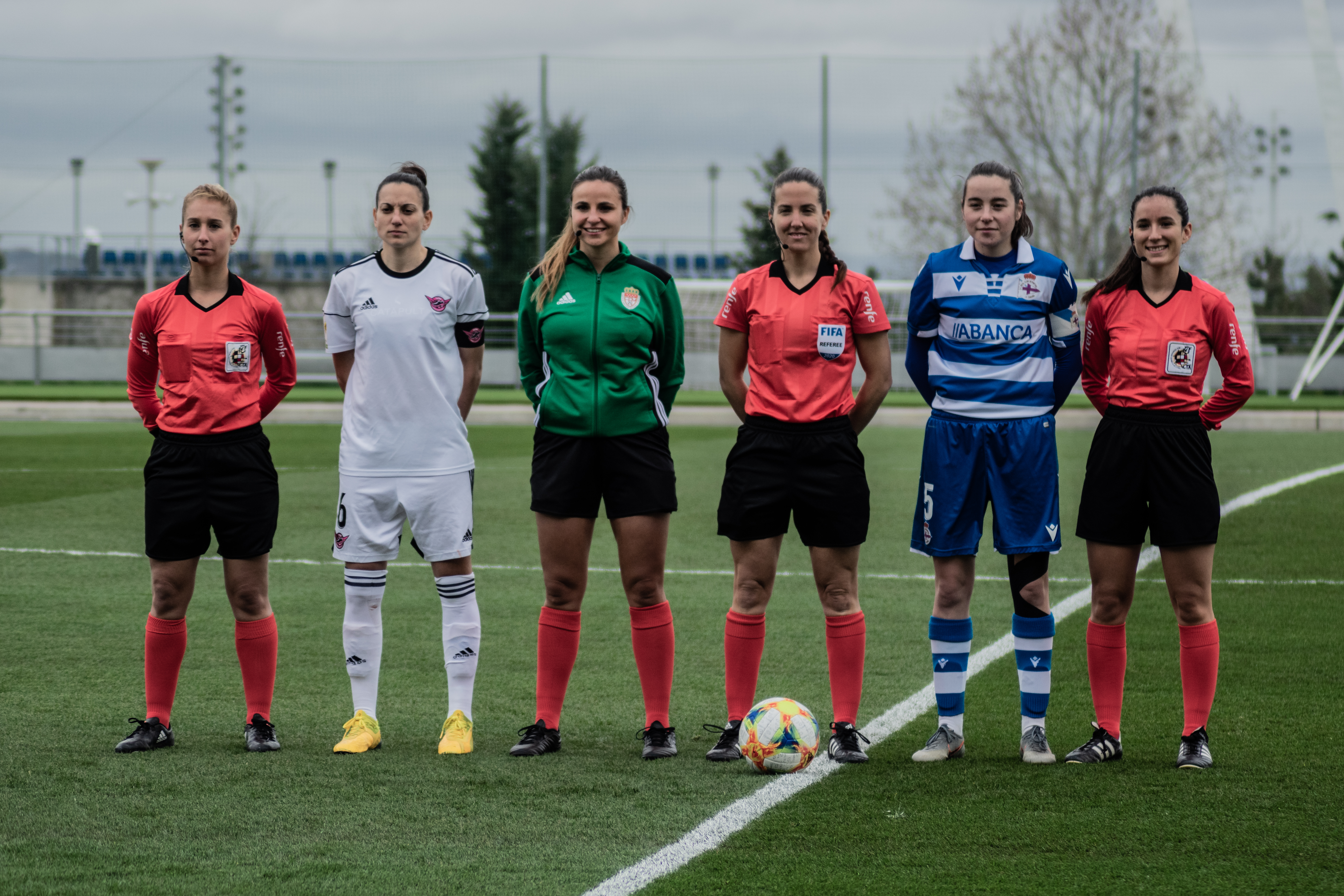 Foto oficial del CD Tacón - Deportivo Abanca del 1 de marzo de 2020, correspondiente a la jornada 22 de Primera División 2019-20. De izquierda a derecha, Sandra Alcoba Montes (árbitra asistente), Aurélie Anne Sophie Kaci (capitana del Tacón), Daniela Elena Postolache (cuarta árbitra), María Dolores Martínez Madrona (árbitra principal), Iris Arnaiz Gil (capitana del Deportivo) y Míriam Morales González (árbitra asistente).